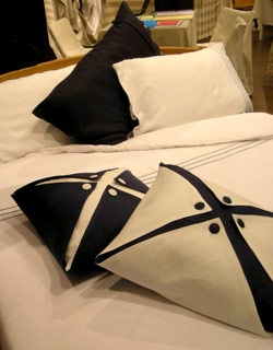 Pitti Immagine 2009